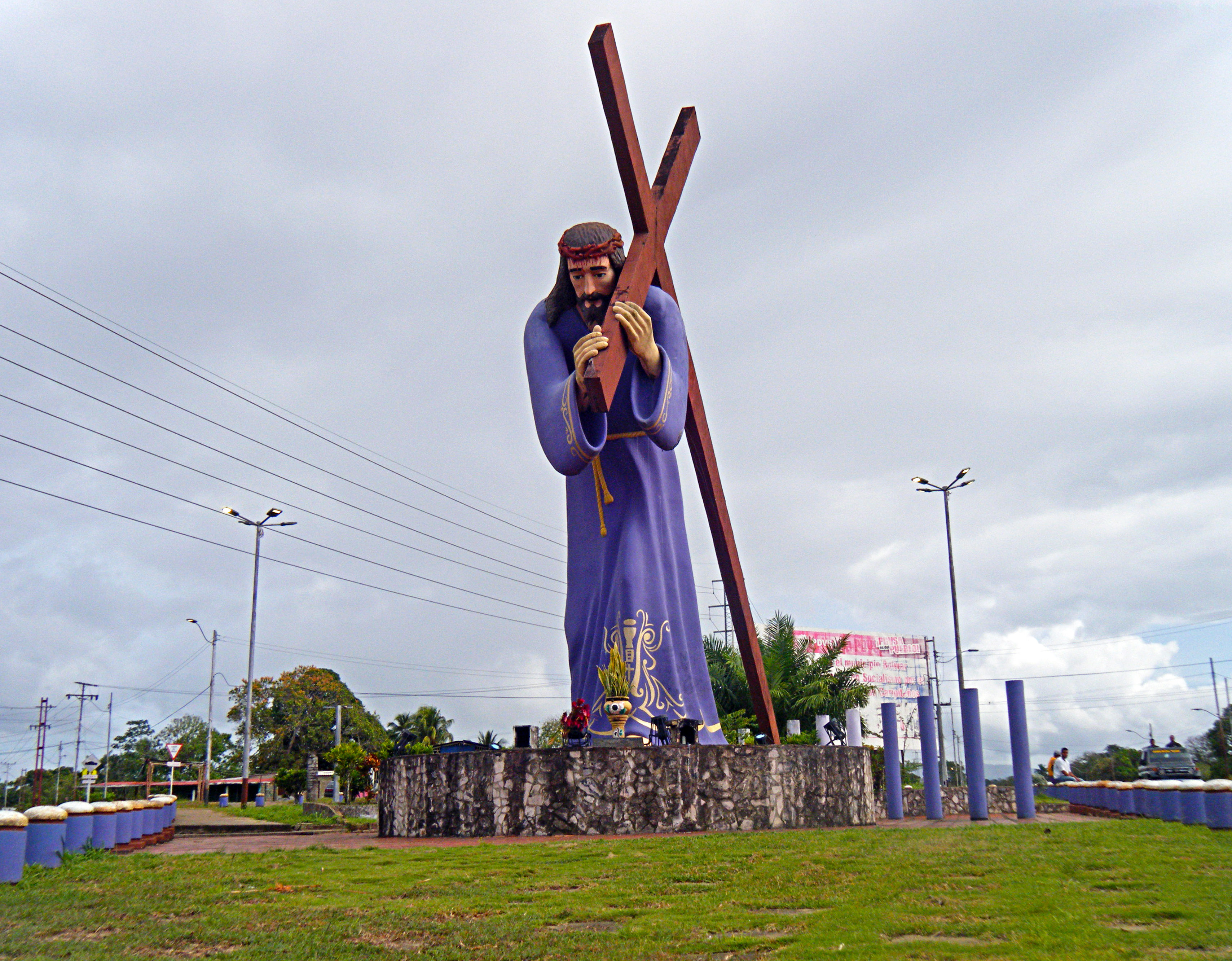 Monumento al Nazareno en Caripito, Estado Monagas, Venezuela.